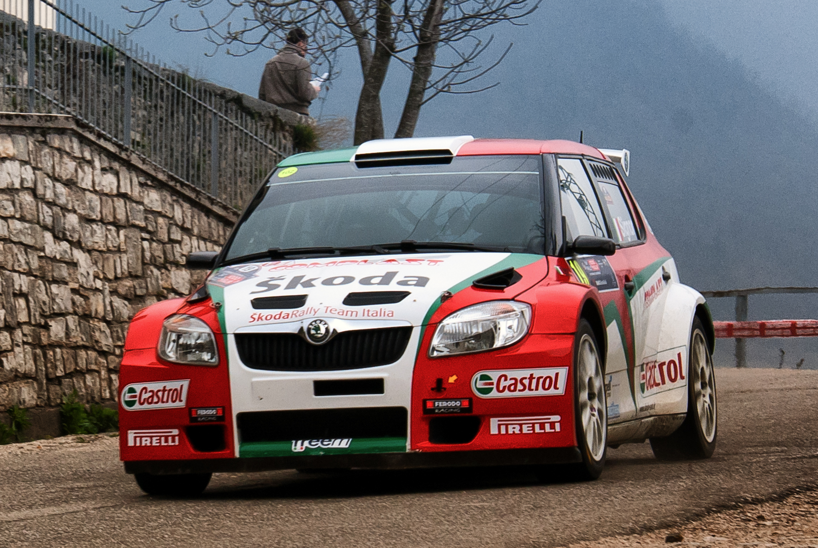 Marco Signor driving a Skoda Fabia S2000 at 2010 Rally 1000 Miglia